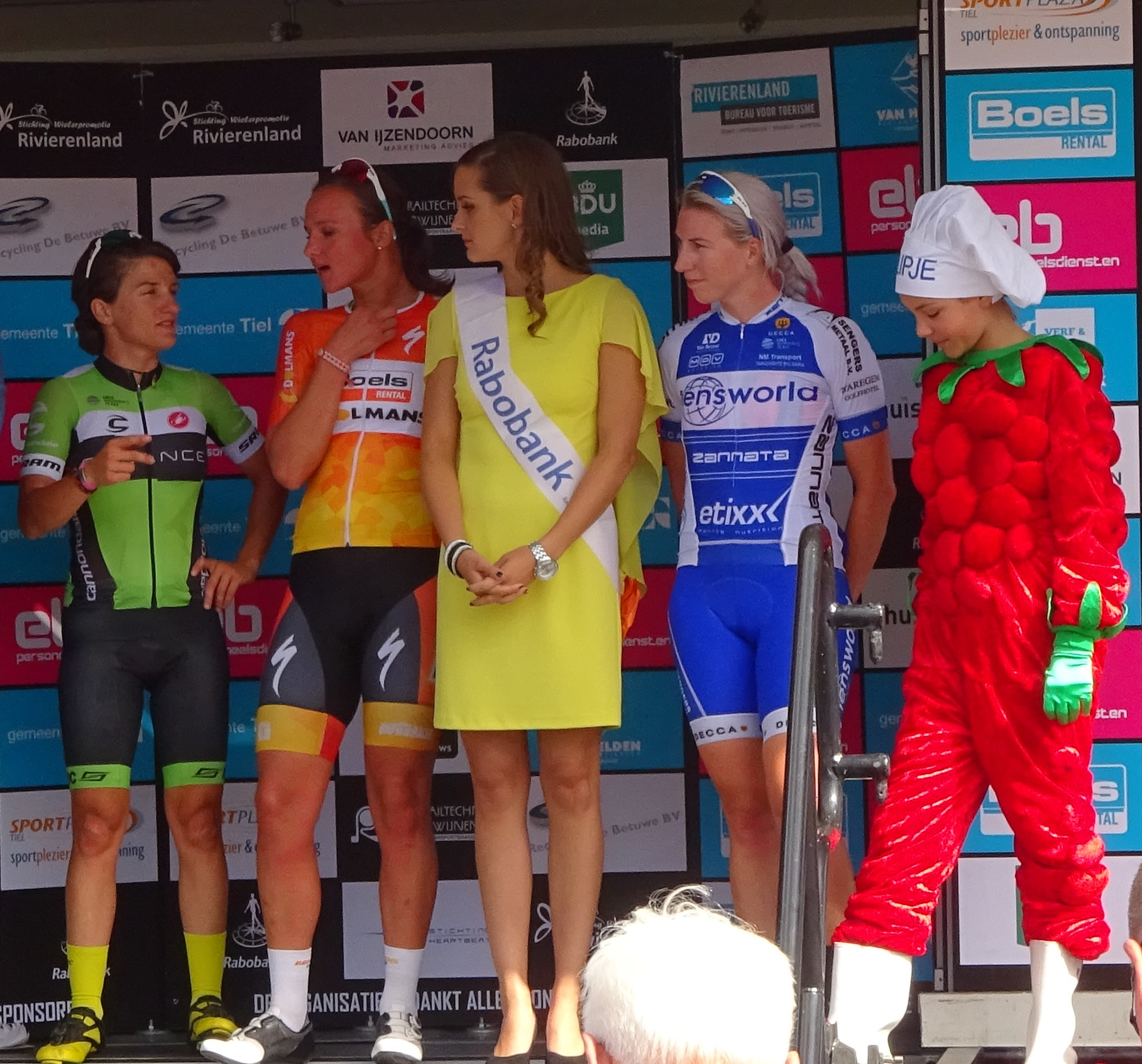 Winnaars damescriterium Profronde Tiel 2016